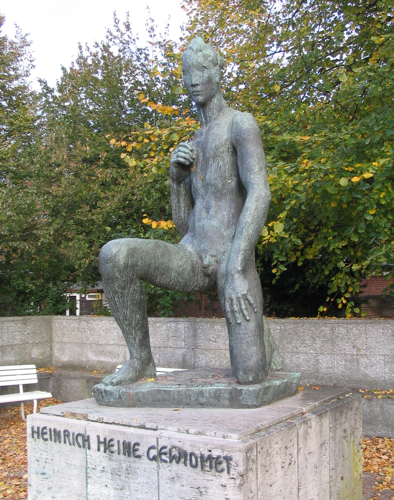 Georg Kolbe, Aufsteigender Jüngling, Düsseldorf Ehrenhof. 1931 schrieb die Stadt Düsseldorf einen Wettbewerb für ein den Bürgern schon lange versprochenes Heinrich-Heine-Denkmal aus, aufzustellen im Ehrenhof. Den Wettbewerb gewann der Berliner Künstler Georg Kolbe vor Arno Breker und Johannes Knubel. Nach zwei Jahren intensiver Arbeit an dem doppelt mannshohen Denkmal hatten sich die politischen Verhältnisse so sehr geändert, dass ein Denkmal zu Ehren des Juden Heine nicht mehr denkbar war, der bereits zweite, sehr späte Versuch für ein Düsseldorfer Heinedenkmal war damit ebenfalls für lange Zeit gescheitert. Man platzierte den knienden Aufsteigenden Jüngling, der nicht Heine zeigt, sondern menschliches Streben und Mühen versinnbildlicht, im Vestibül des Hetjens-Museums, das sich damals noch im Ehrenhof befand. Von dort kam er nach dem Krieg ins Kunstmuseum, 1949 endlich auf einem neu geschlagenen Sockel aus Muschelkalk an die dafür vorgesehene Stelle auf der östlichen Seite des Ehrenhofs, immer noch ohne den Hinweis auf Heine. 1953 entstand stattdessen eine Heine-Gedenkstätte im Hofgarten, 1981 schuf Bert Gerresheim das Heine-Monument am Rand der Parkanlage Schwanenmarkt. Seit 2002 weist inzwischen eine erklärende Plakette und eine Inschrift auf den Zusammenhang vom „Aufsteigenden Jüngling“ zu Heine hin. Das gespaltene Verhältnis Düsseldorfs zur Ehrung Heines war auch im Zusammenhang mit den Querelen um die Heine-Denkmäler immer wieder Mittelpunkt öffentlicher Diskussion. Ein weiteres Werk Kolbes, der Stehende Jüngling, ist wenige hundert Meter nördlich, in der Kaiserswerther Straße 137, vor dem Drahthaus aufgestellt.